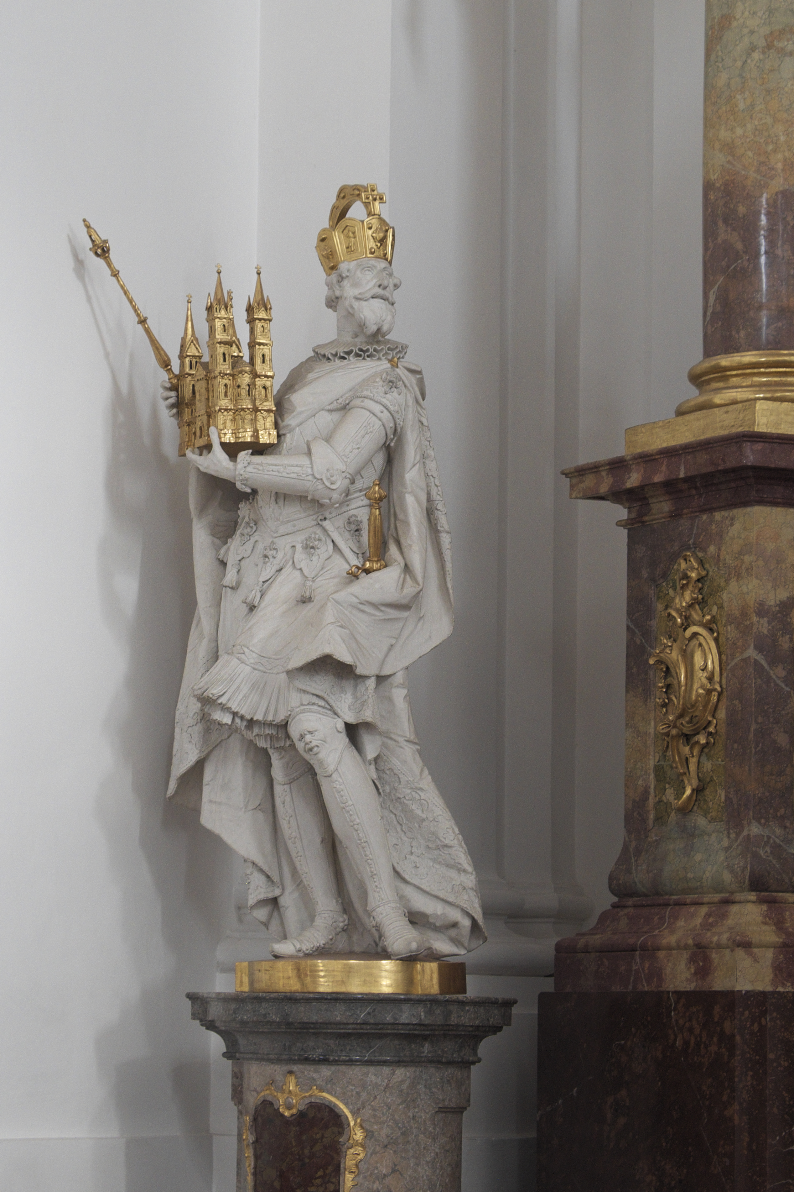 Katholische Pfarrkirche St. Marinus und Anianus, ehemalige Abteikirche des Benediktinerklosters Rott in Rott am Inn im Landkreis Rosenheim (Bayern/Deutschland), Hauptaltar